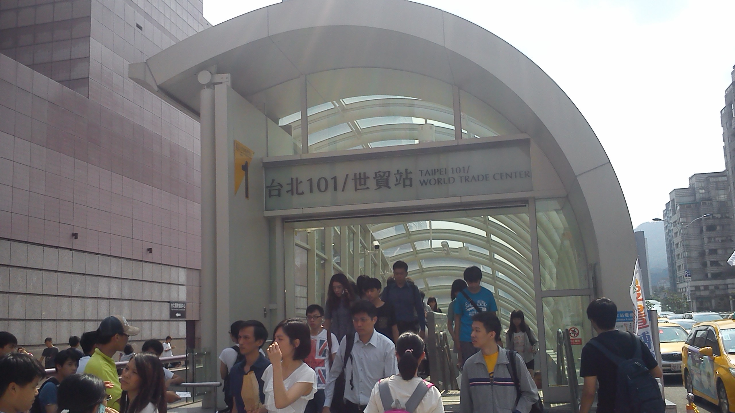 臺北捷運臺北101/世貿站出口1